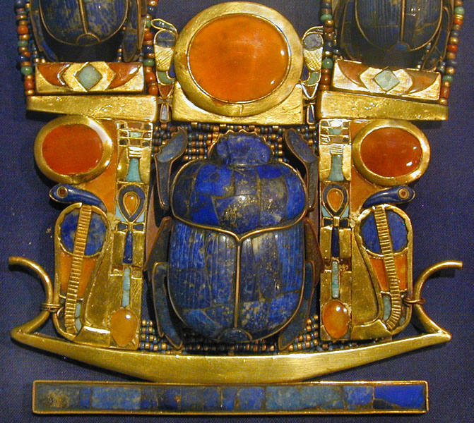 Scarabée (or et lapis-lazuli) poussant le disque solaire (cornaline cerclée d'or) Dans le seul cercueil d'or de Toutânkhamon, 143 bijoux enfouis dans les bandelettes du linceul recouvraient la momie de Toutankhamon : gorgerins en or plat, pectoraux, pendentifs, bracelets, bagues, etc. Beaucoup d'autres bijoux se trouvaient dans le mobilier funéraire notamment dans la chambre du trésor. La plupart des bijoux du trésor sont réalisés en or cloisonné, incrusté de cornaline et de pâtes de verre rouges, bleu clair et bleu sombre. La tombe de Toutankhamon (1340-1331 AV. J.C.) a été découverte par Howard Carter en novembre 1922. Le pharaon est mort à 19 ans, sa momie se trouvait dans un cercueil en or massif, placé à l'intérieur de 2 cercueils en bois. Ces 3 cercueils étaient dans un sarcophage de quartzite à couvercle de granit rouge. Autour du sarcophage, s'emboîtaient les unes dans les autres, 4 chapelles en bois doré qui occupaient entièrement la salle du sarcophage.